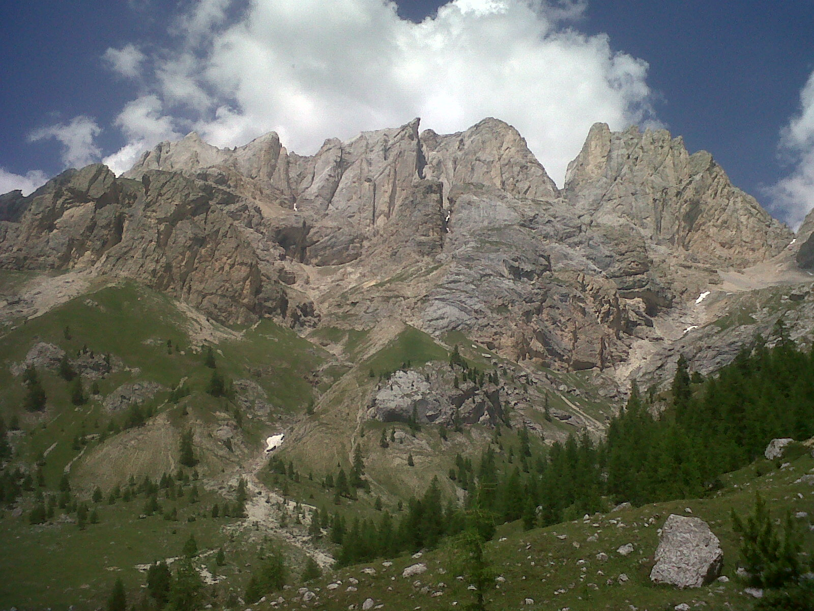 La Marmolada vista dalla Val Contrin.